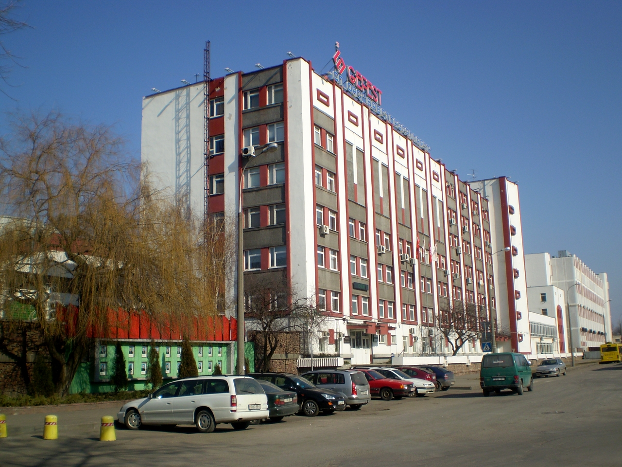 «Гефест» (ААТ «Брэстгазаапарат»)